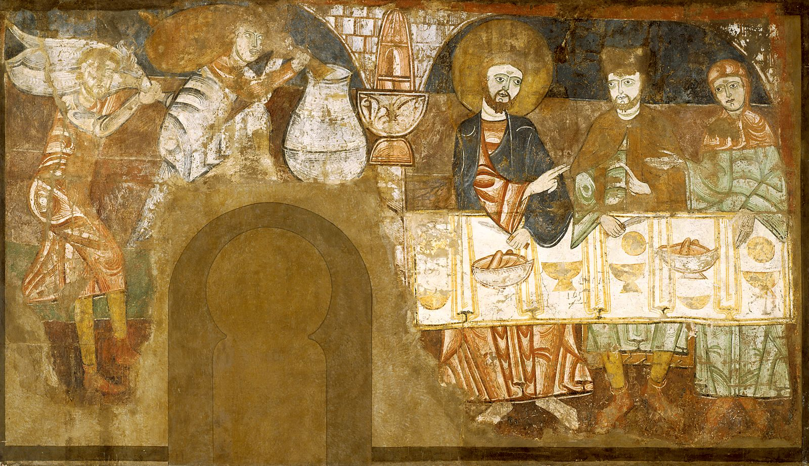 de la ermita de San Baudelio de Berlanga (Soria)